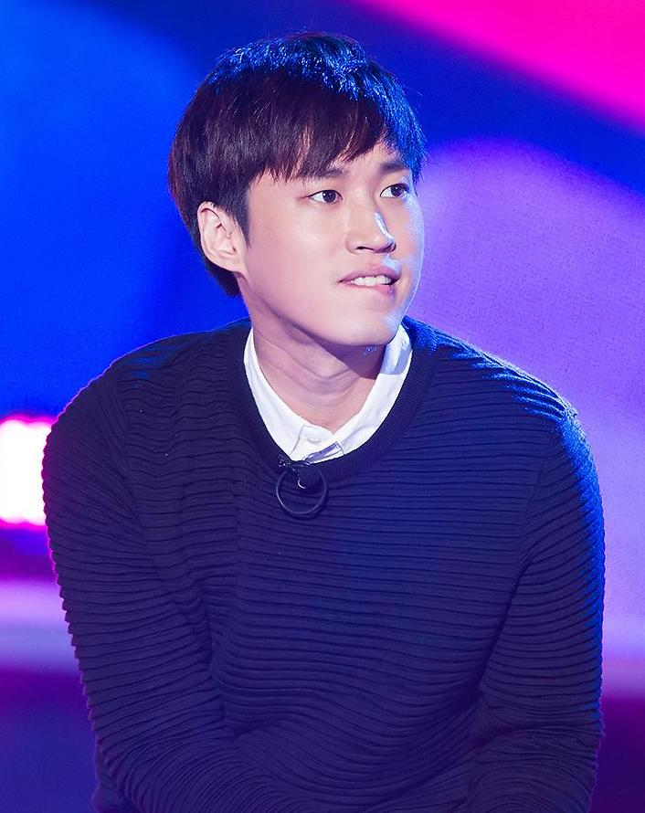 140904 크게 라디오를 켜고